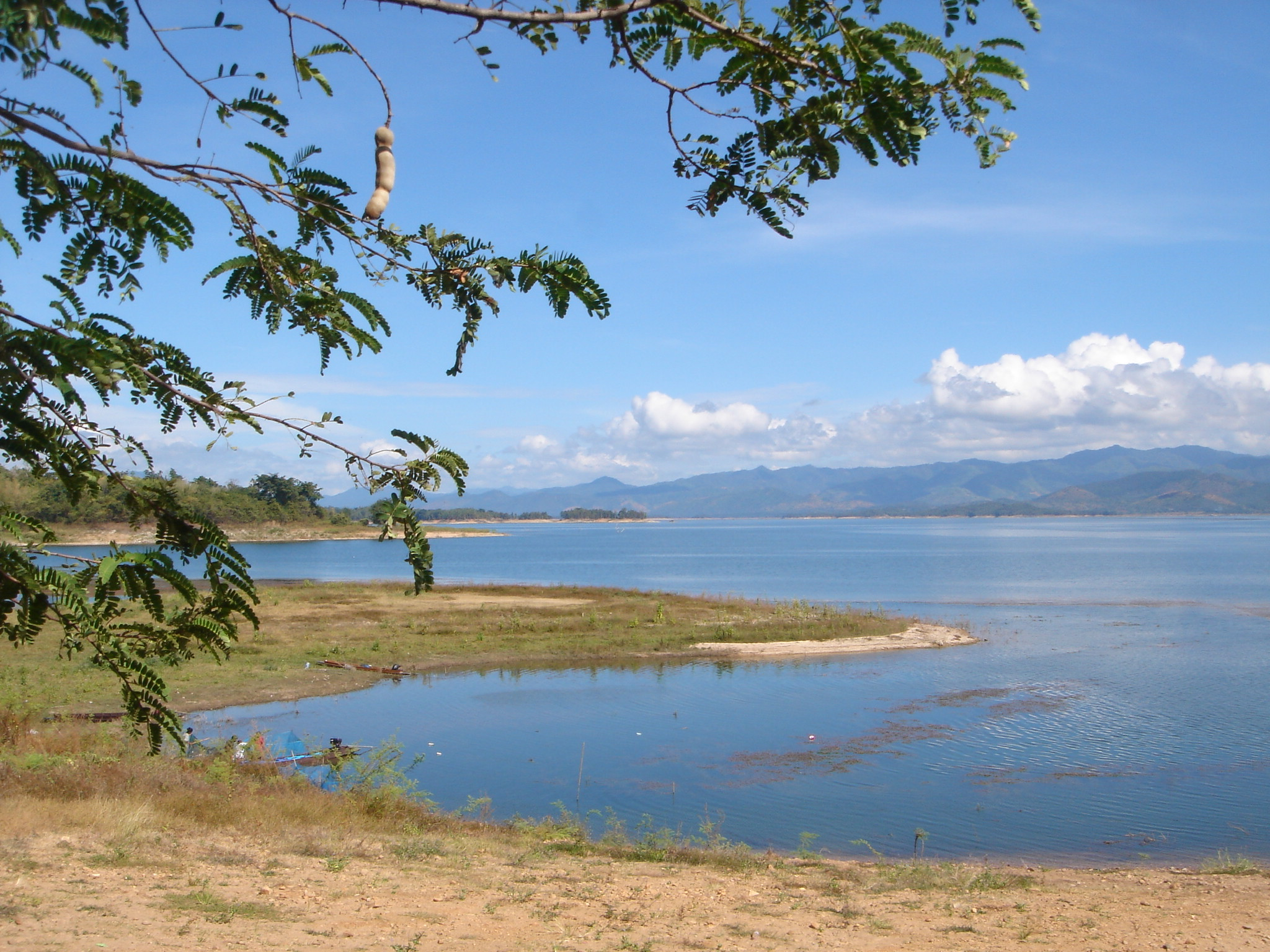 ทิวทัศน์เหนือเขื่อนศรีนครินทร์